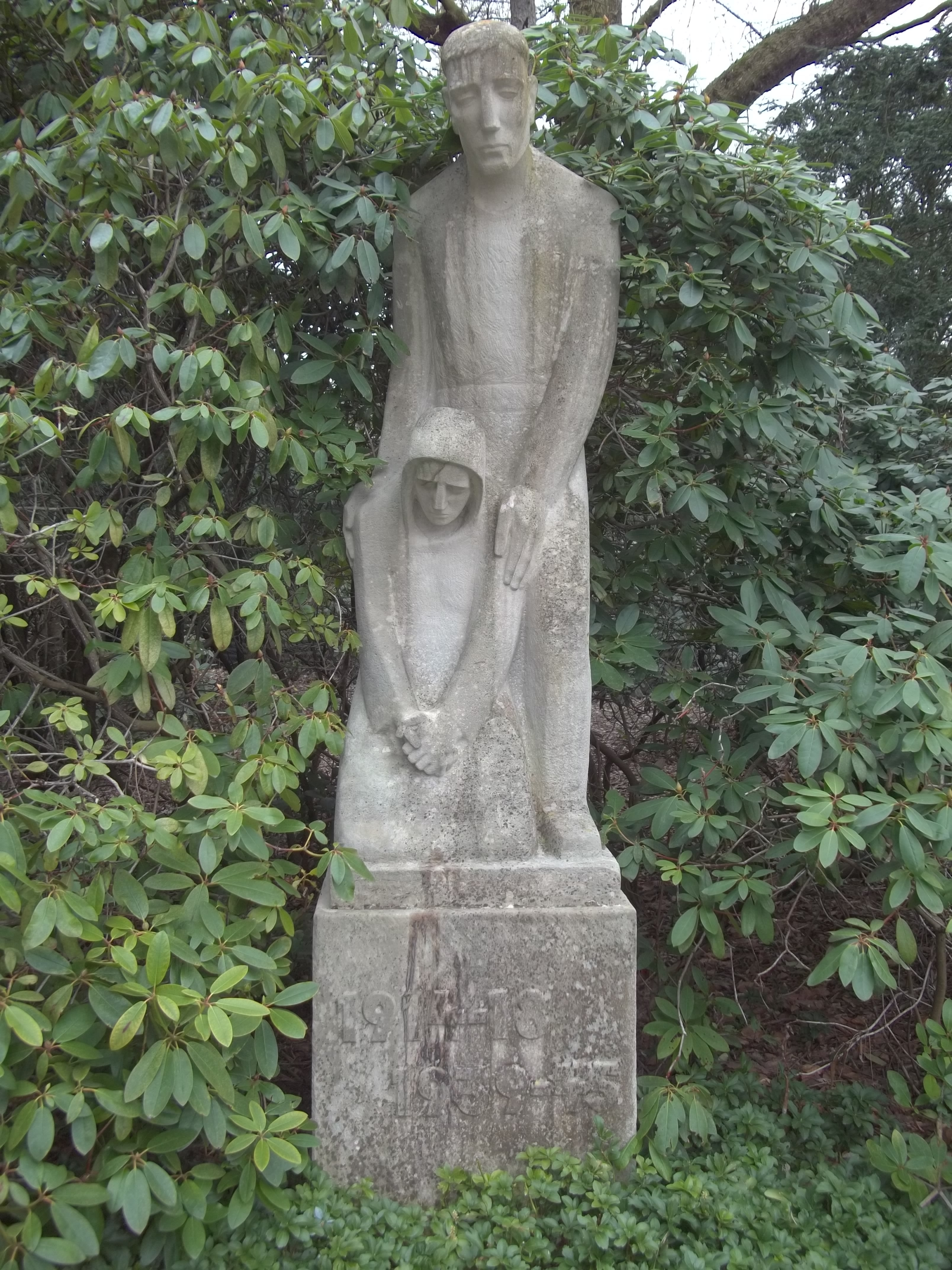 Waldfriedhof Herten